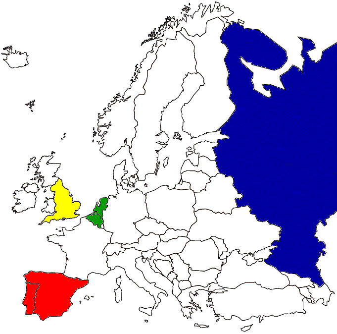 Russia 2018 bids